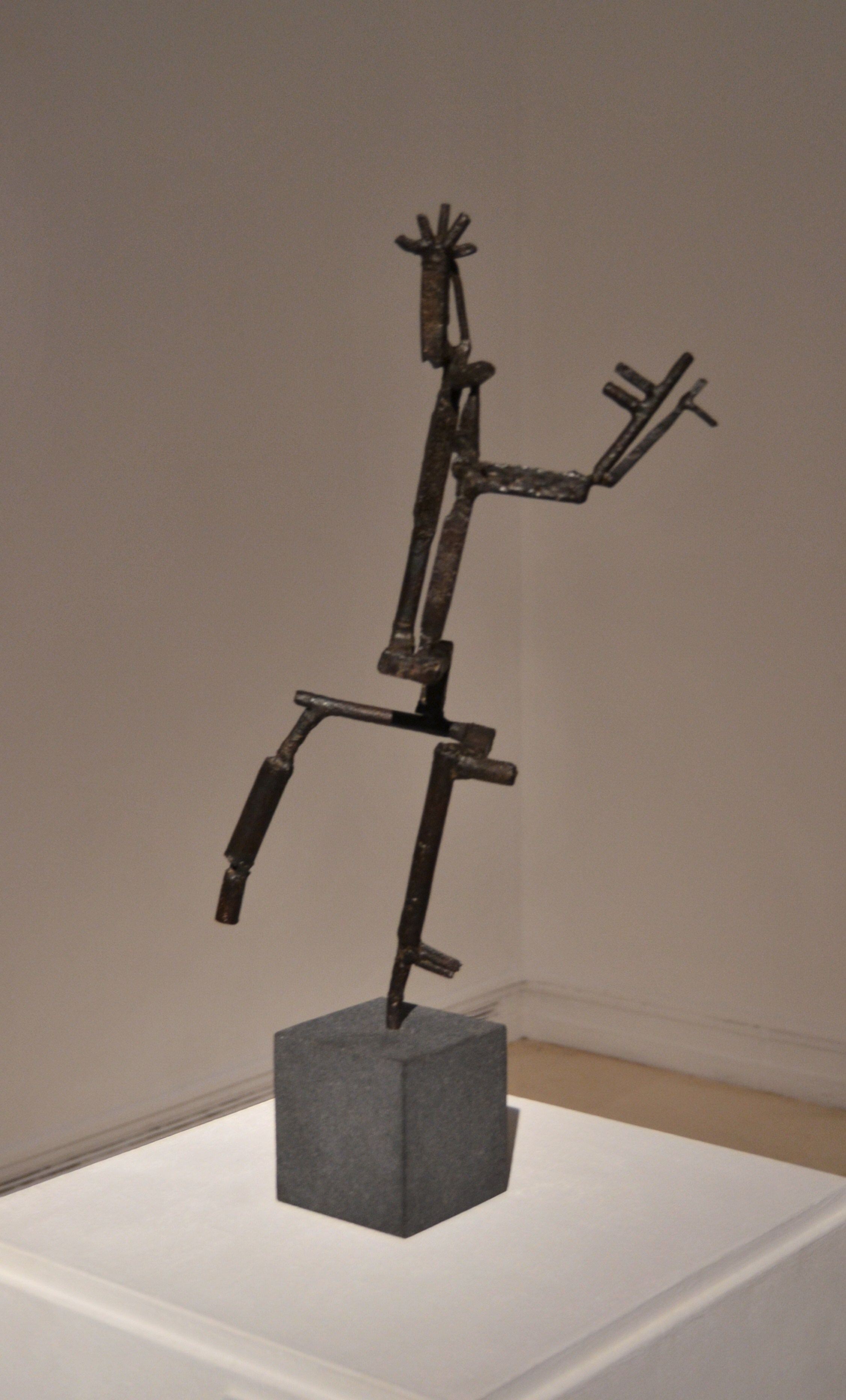 Danseuse à la marguerite, 1937, Julio Gonzalez. Ferro forjat i soldat, 48,3 x 29,2 x 10 cm. Institut Valencià d'Art Modern.